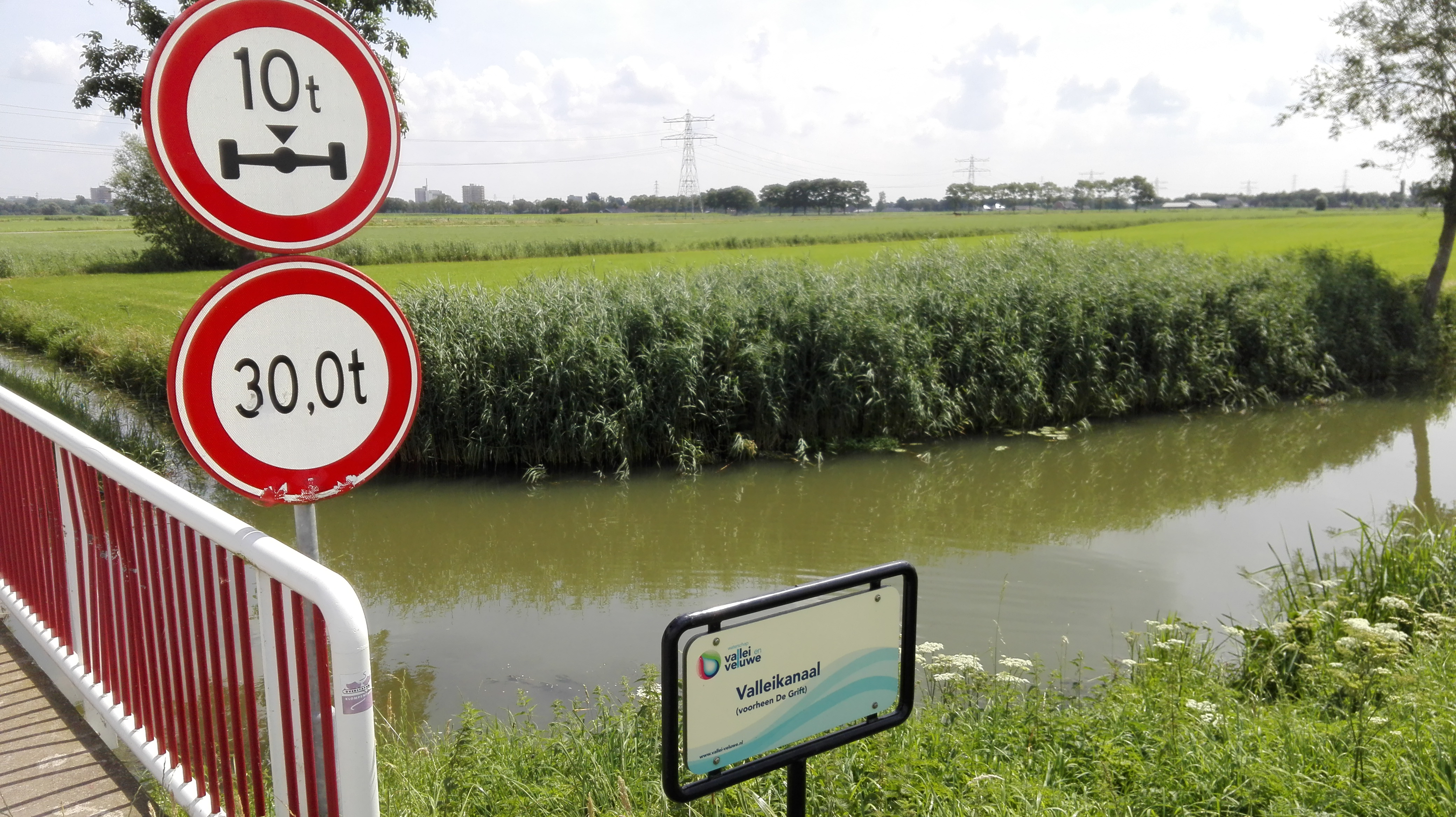 Valleikanaal in het Binnenveld tussen Wageningen en Achterberg gezien vanaf de Zijdvang aan de westkant van de brug richting het zuidoosten. Hoogbouw van Wageningen op de achtergrond.